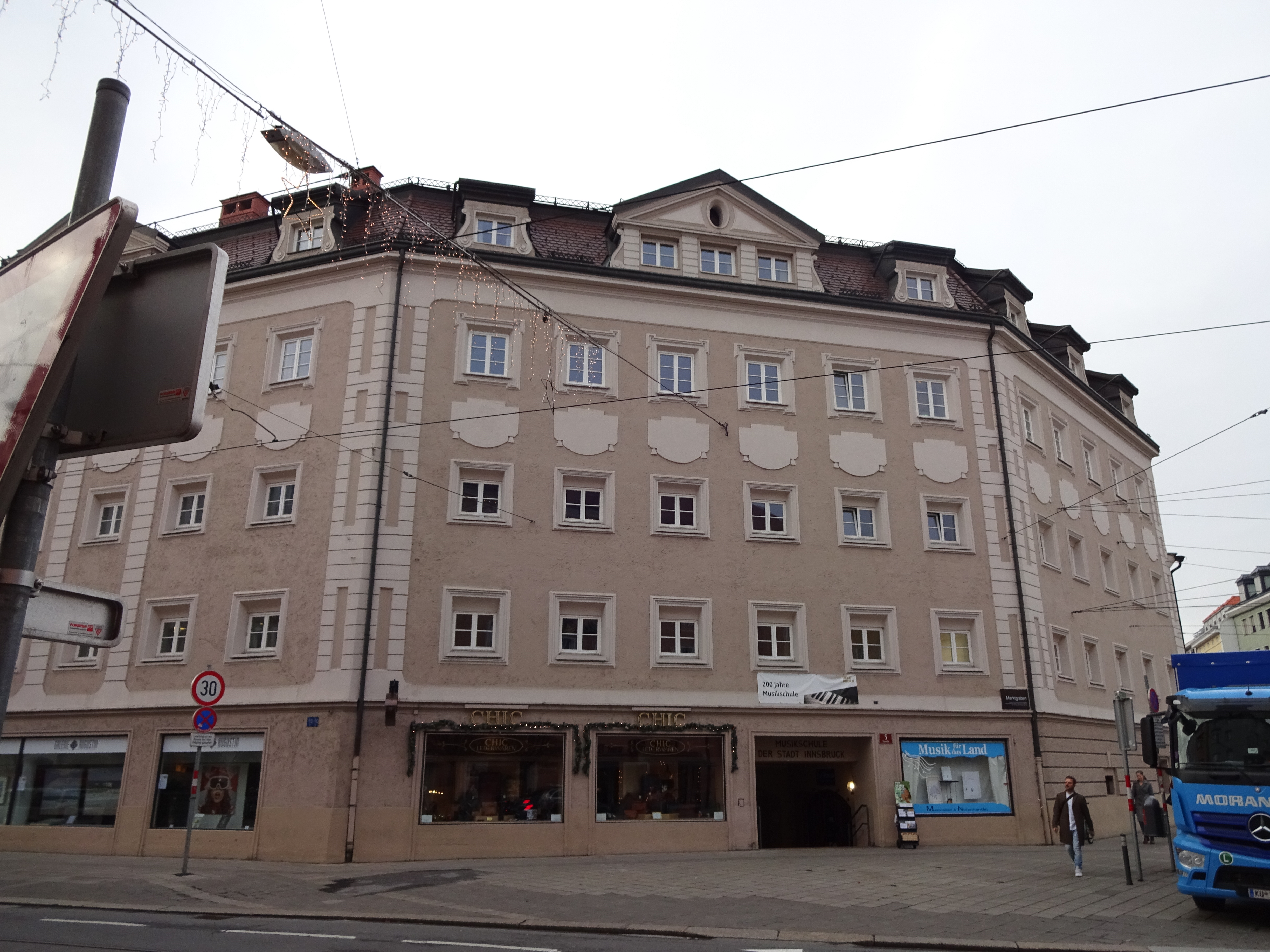 Ehemaliges Ursulinenkloster am Marktgraben, Innsbruck; heute u.a. von Mozarteum und Musikschule der Stadt Innsbruck genutzt This media shows the remarkable cultural object in the Austrian state of Tyrol listed by the Tyrolean Art Cadastre with the ID 118270. (on tirisMaps, pdf, more images on Commons, Wikidata)